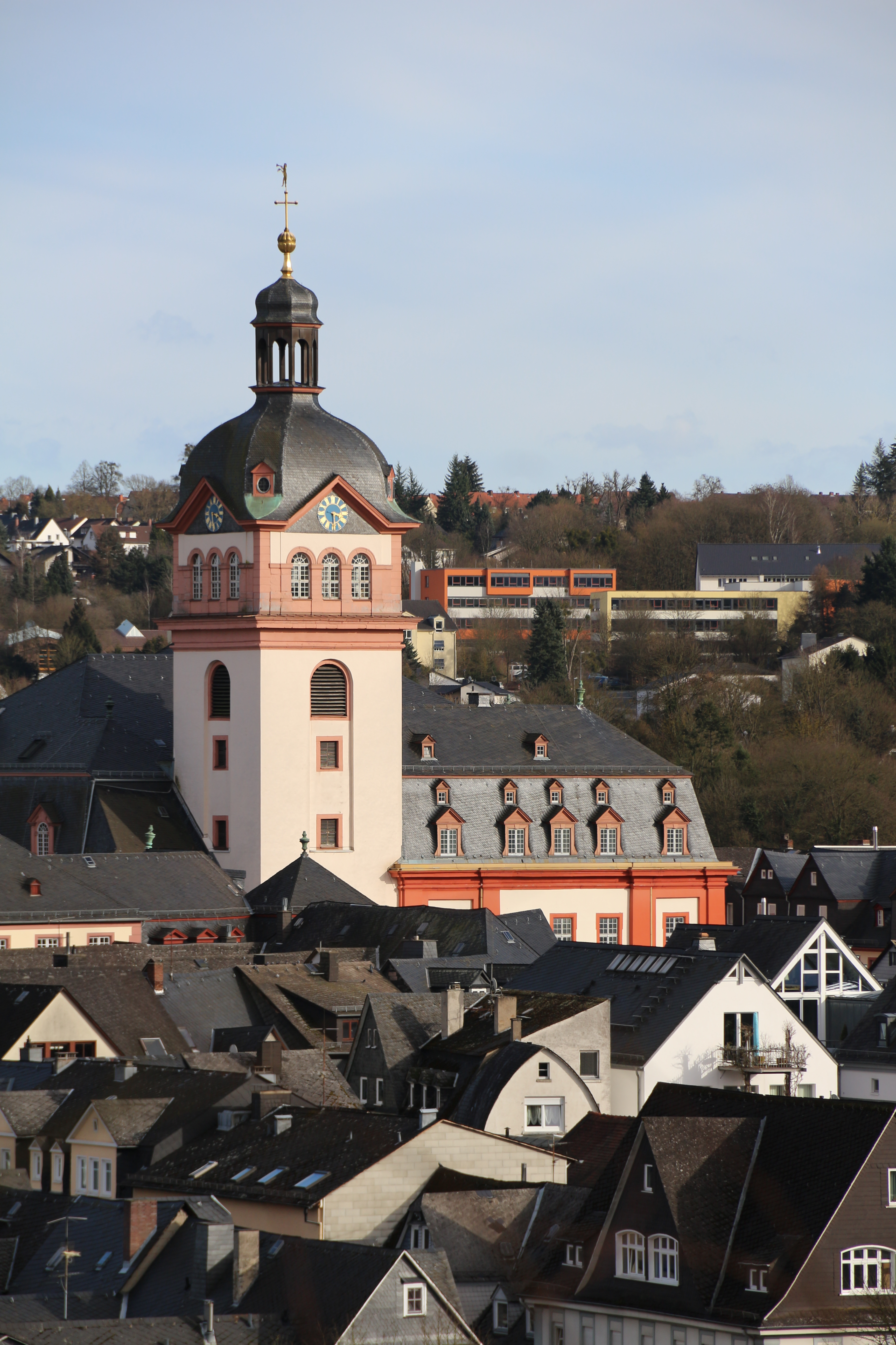 Turm der Schlosskirche. Rechts neben dem Turm das Dachgeschoss des alten Rathauses. Oberhalb des alten Rathauses die weit entfernte, aber durch ihre auffällige Gestaltung gut erkennbare Wilhelm-Knapp-Schule.